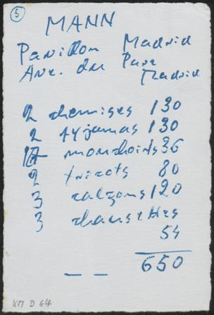 Klaus Mann Paris, 16.7.1938 Lieferschein/Rechnung für Wäsche Madame Verdan (Blanchissage de Linge Fin) Nachlass Klaus Mann/Biografische Dokumente